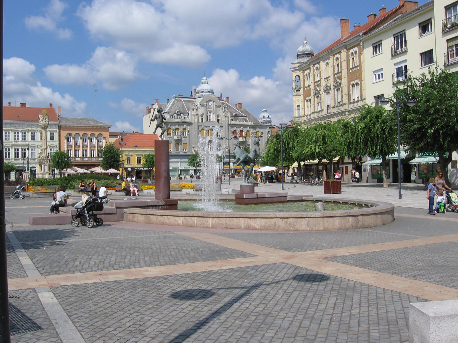 Magyarország